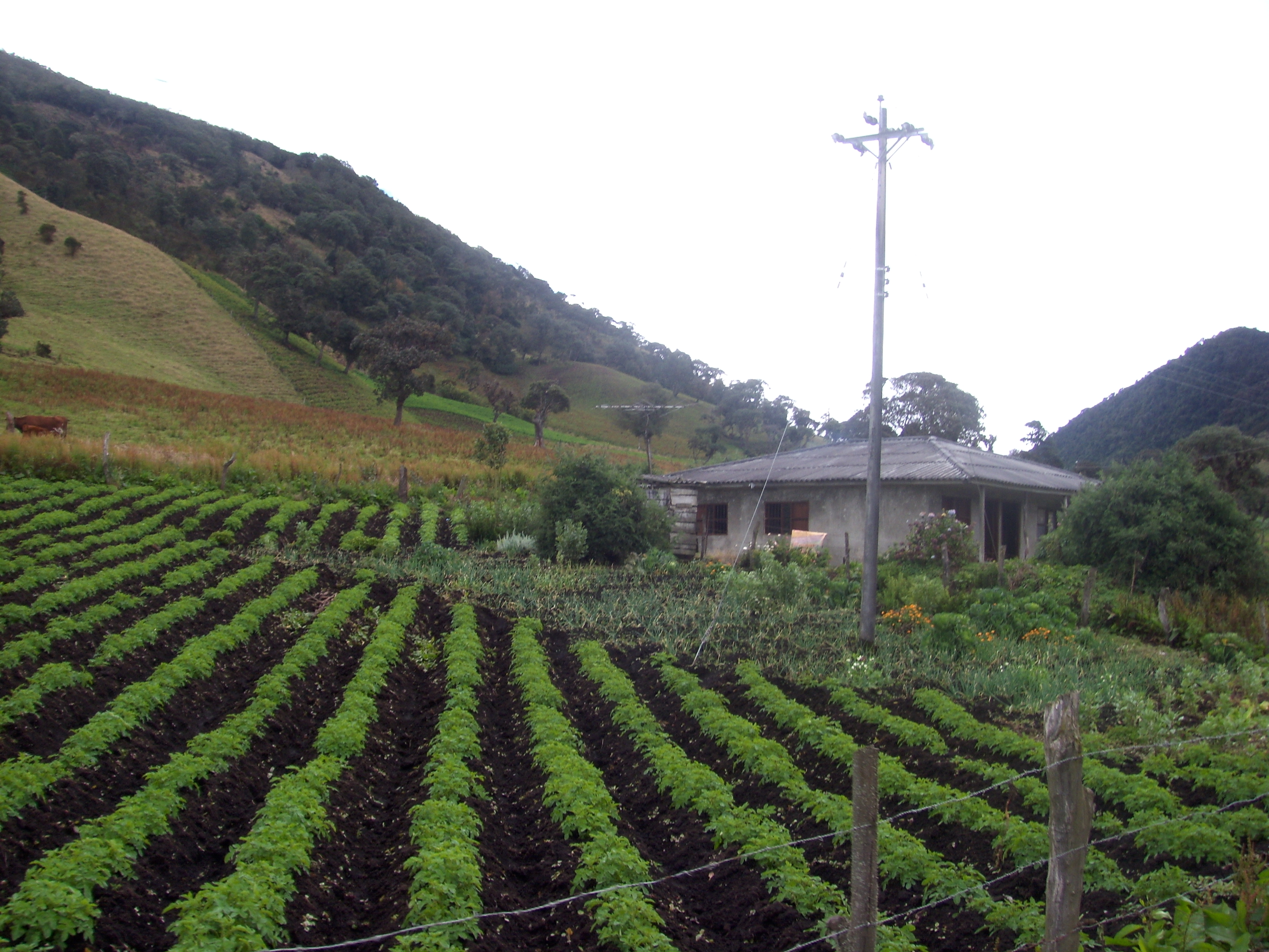 Cultivo grande